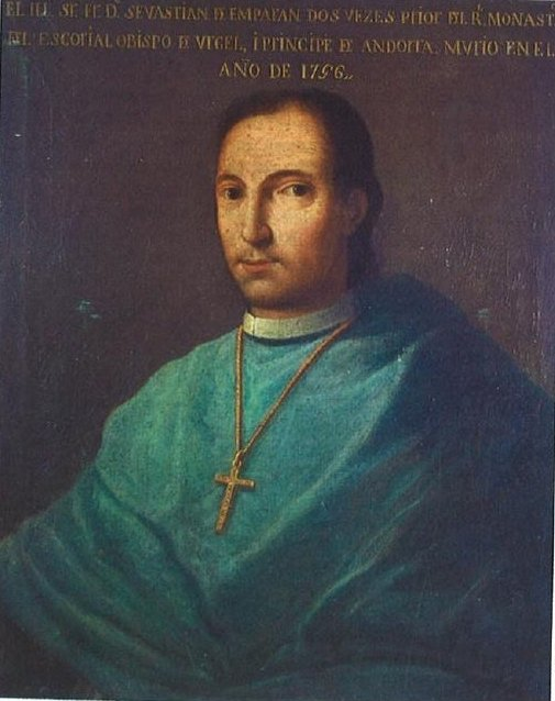 Sebastián Joseph de Emparan y Azcue (1683-1756). Fue monje de la Orden de San Jerónimo, dos veces prior del monasterio de El Escorial y después obispo de Urgel, a la vez que Príncipe Soberano de los Valles de Andorra.